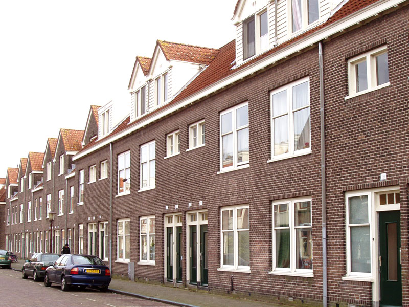 Leeuwerikstraat in de Vogelbuurt in Amsterdam-Noord